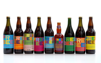 CERVEZA GRATIS está basada en la clásica tradición ale elaboración de la cerveza, pero con addded Guaraná para un impulso de energía natural. Los elementos de la receta y la marca de cerveza gratis se publica bajo licencia Creative Commons (Reconocimiento-CompartirIgual 2.5) de licencia, lo que significa que cualquiera puede utilizar la receta para preparar su propia cerveza gratis o crear un derivado de la receta.